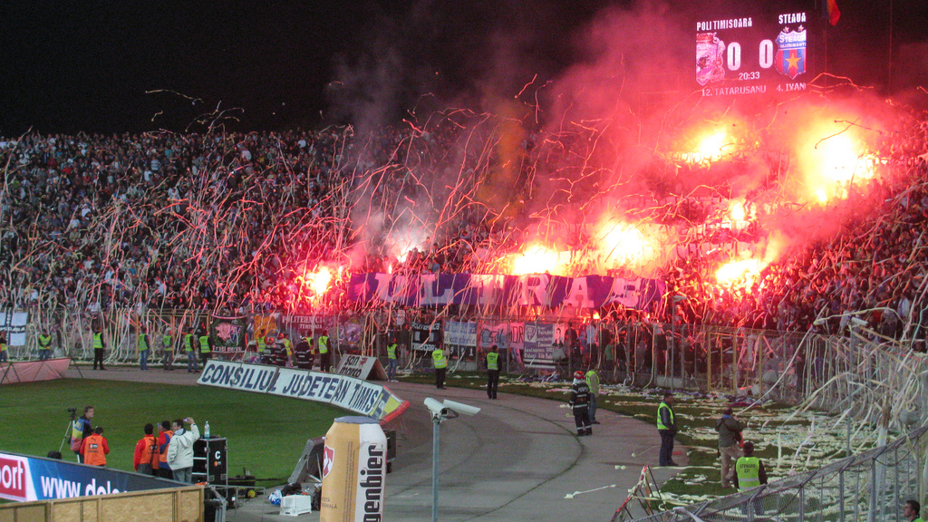 Poli Timisoara 0 - 0 Steaua Bucuresti (meciul vazut din tribuna) - 2 aprilie 2011